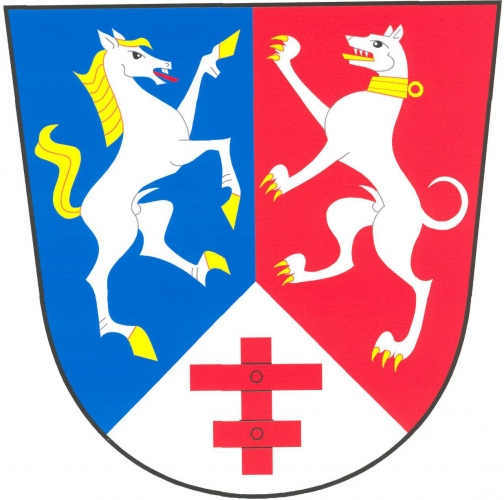 znak, Oldřichov, okres Tábor